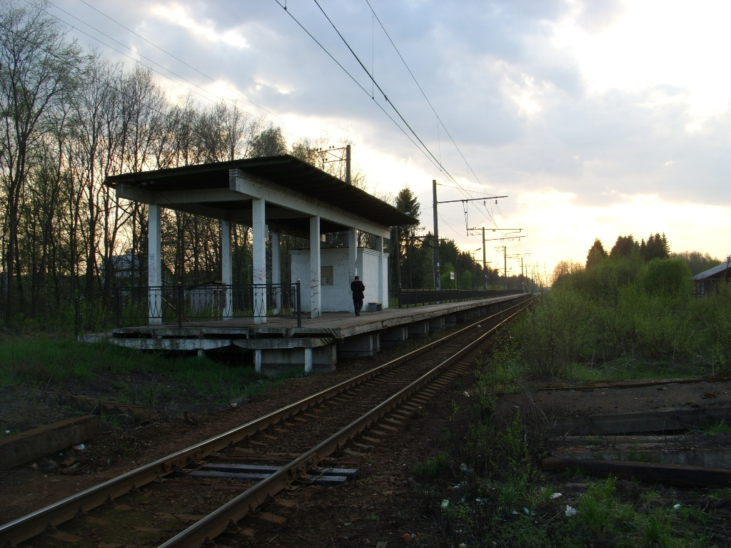 Пл. Щеглово, вид в сторону Санкт-Петербурга